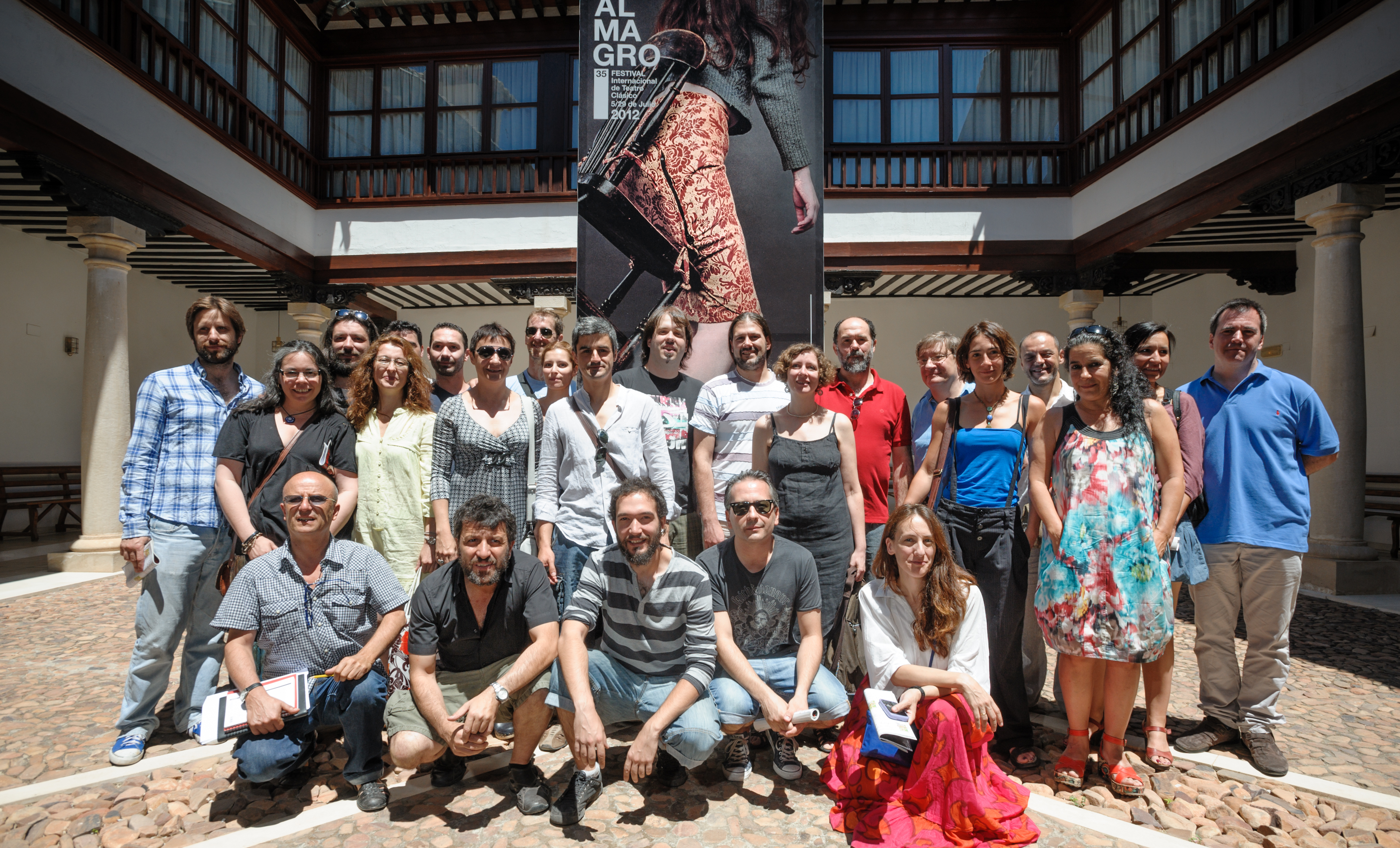 La Compañía Nacional de Teatro Clásico en la 35 edición del Festival Internacional de Teatro Clásico de Almagro. Foto: Guillermo Casas